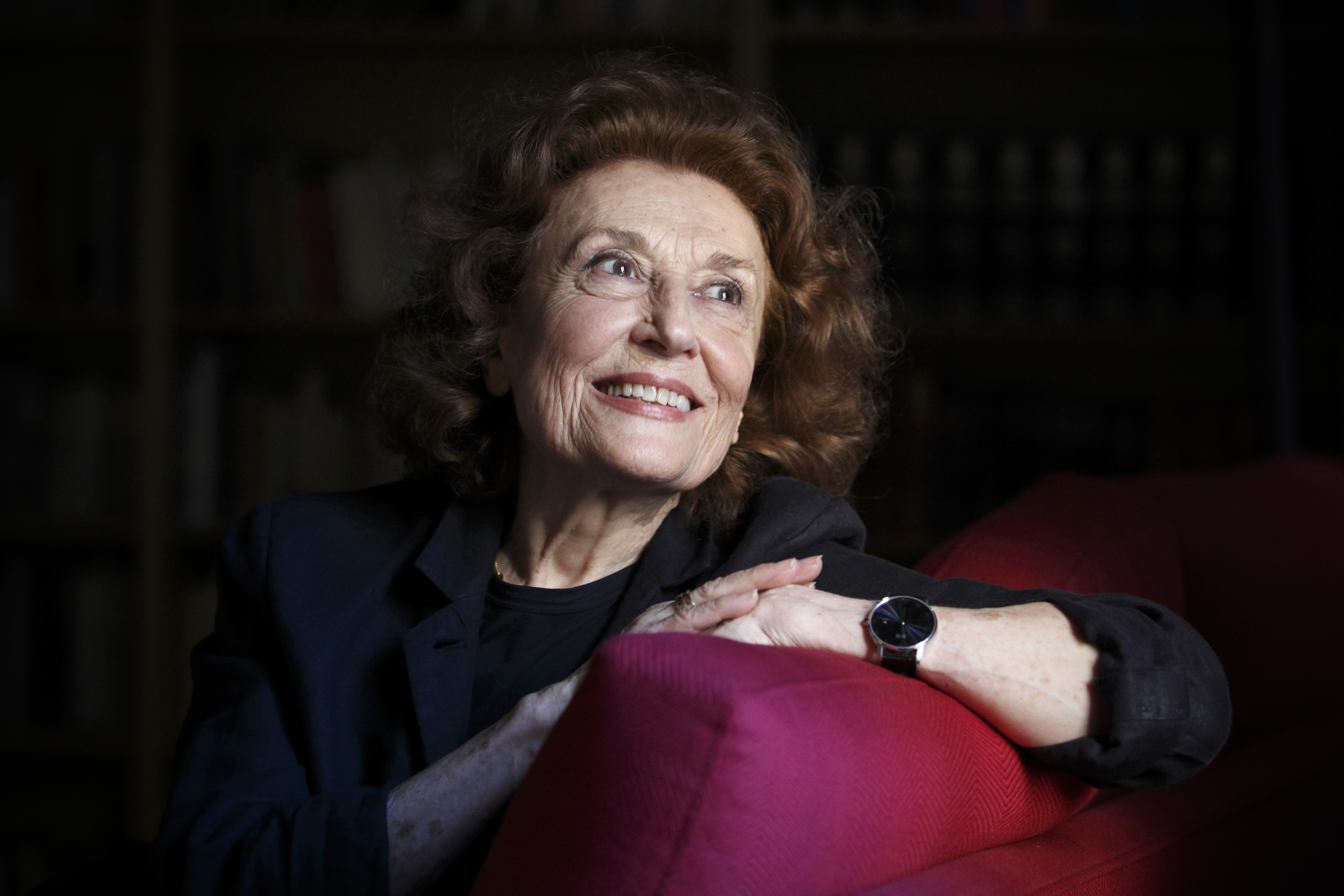 Julia Gutiérrez Caba 14º Premio Corral de Comedias © Enrique Cidoncha